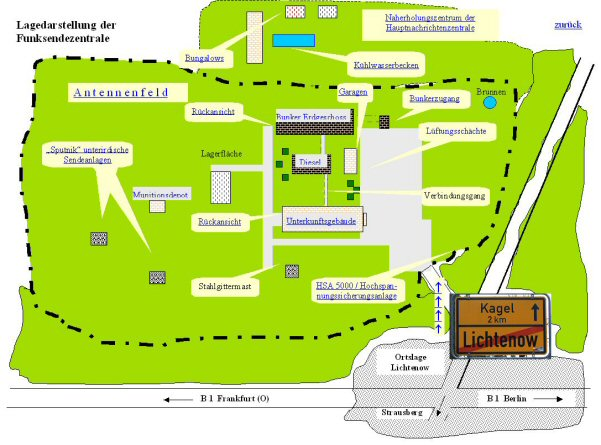 Die Grafik zeigt die Lage der Elemente der Funksendezentrale Kagel. Quelle:J.Kampe